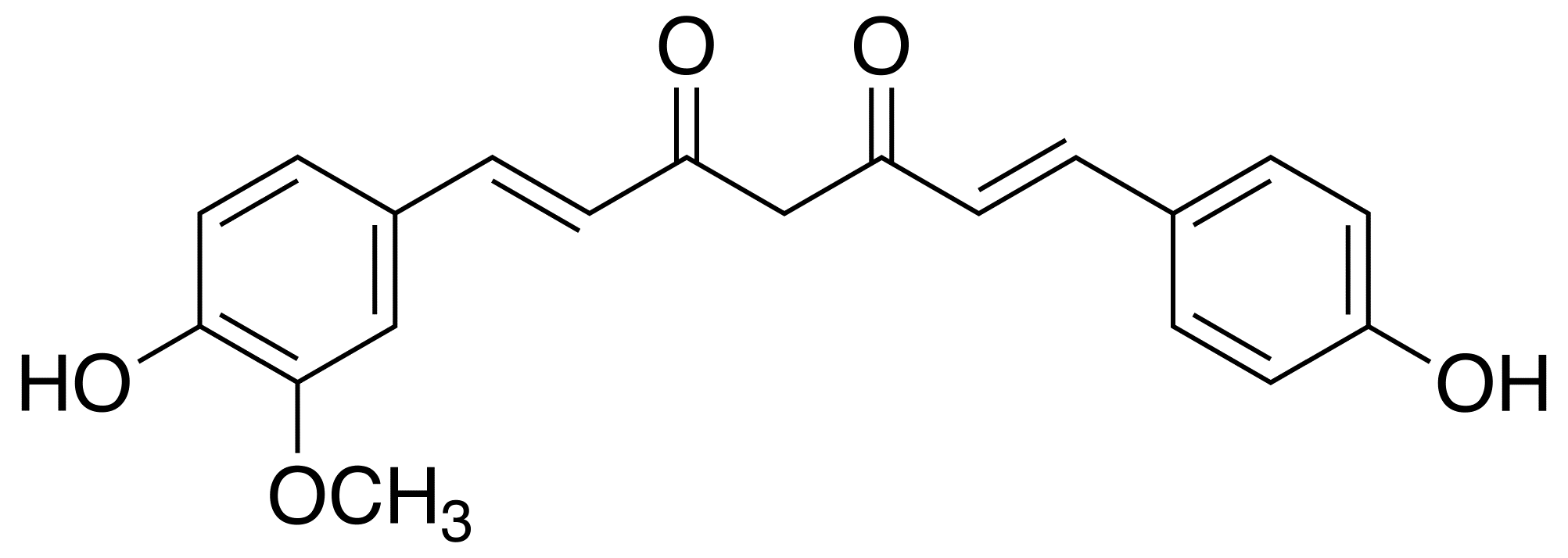 Skeletal structure of demethoxycurcumin, a curcuminoid.